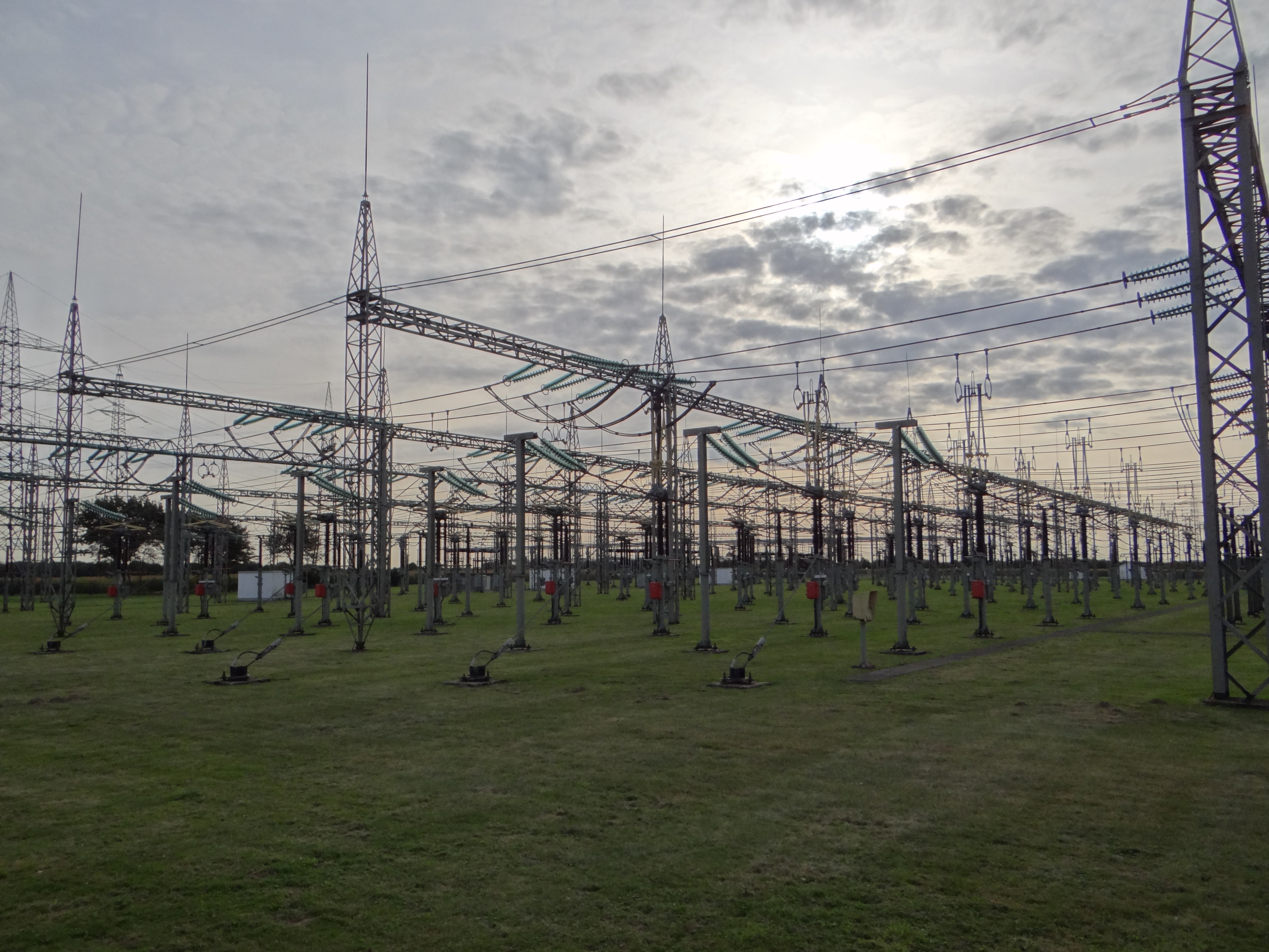 Umspannanlage Osterath in Meerbusch-Osterath, Freigelände, Freiluftschaltanlage